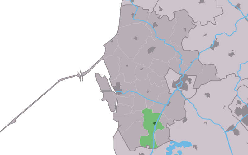 Kaartsje fan himrik fan Parregea